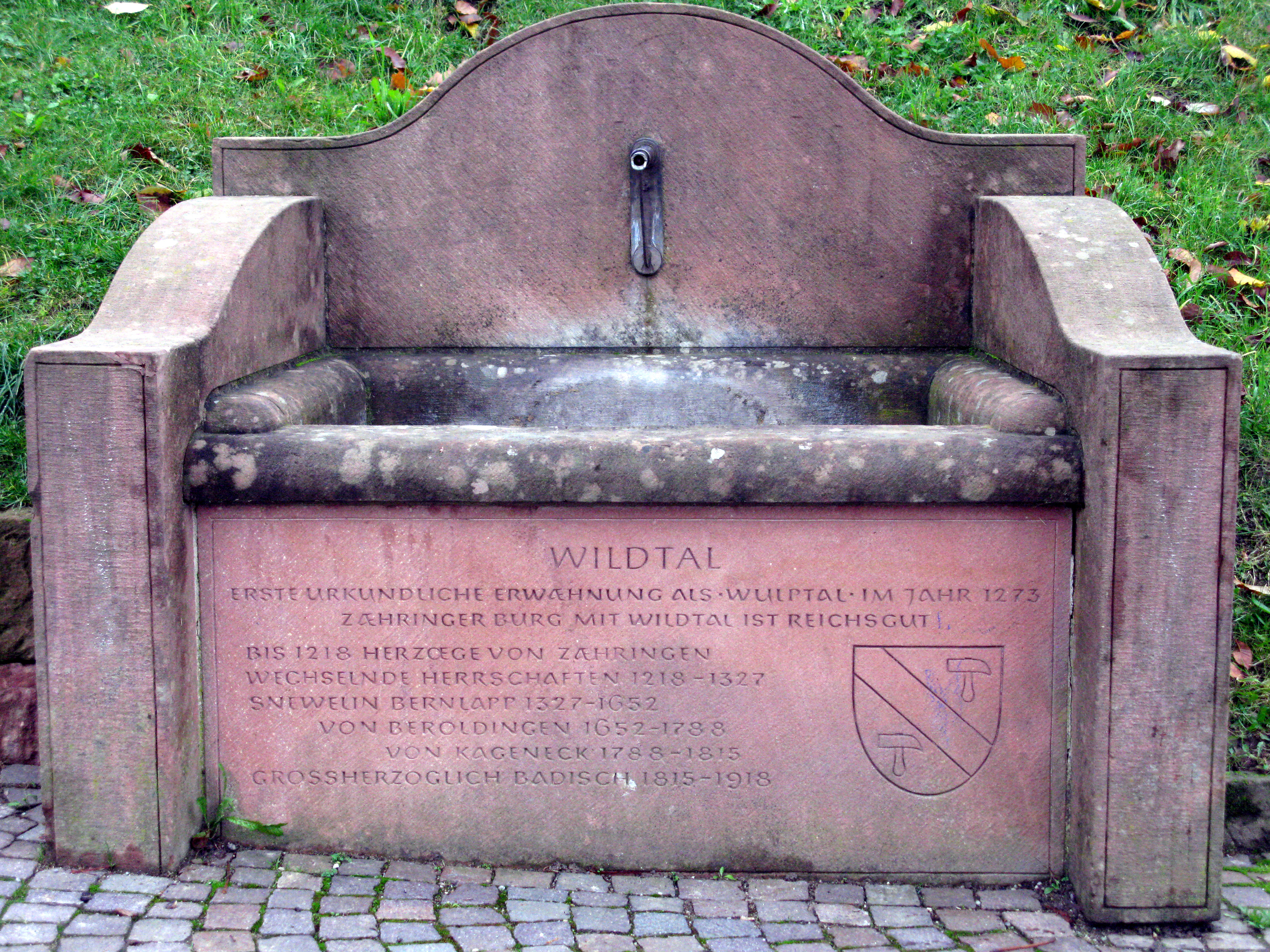 Brunnen in Gundelfingen-Wildtal mit Inschrift